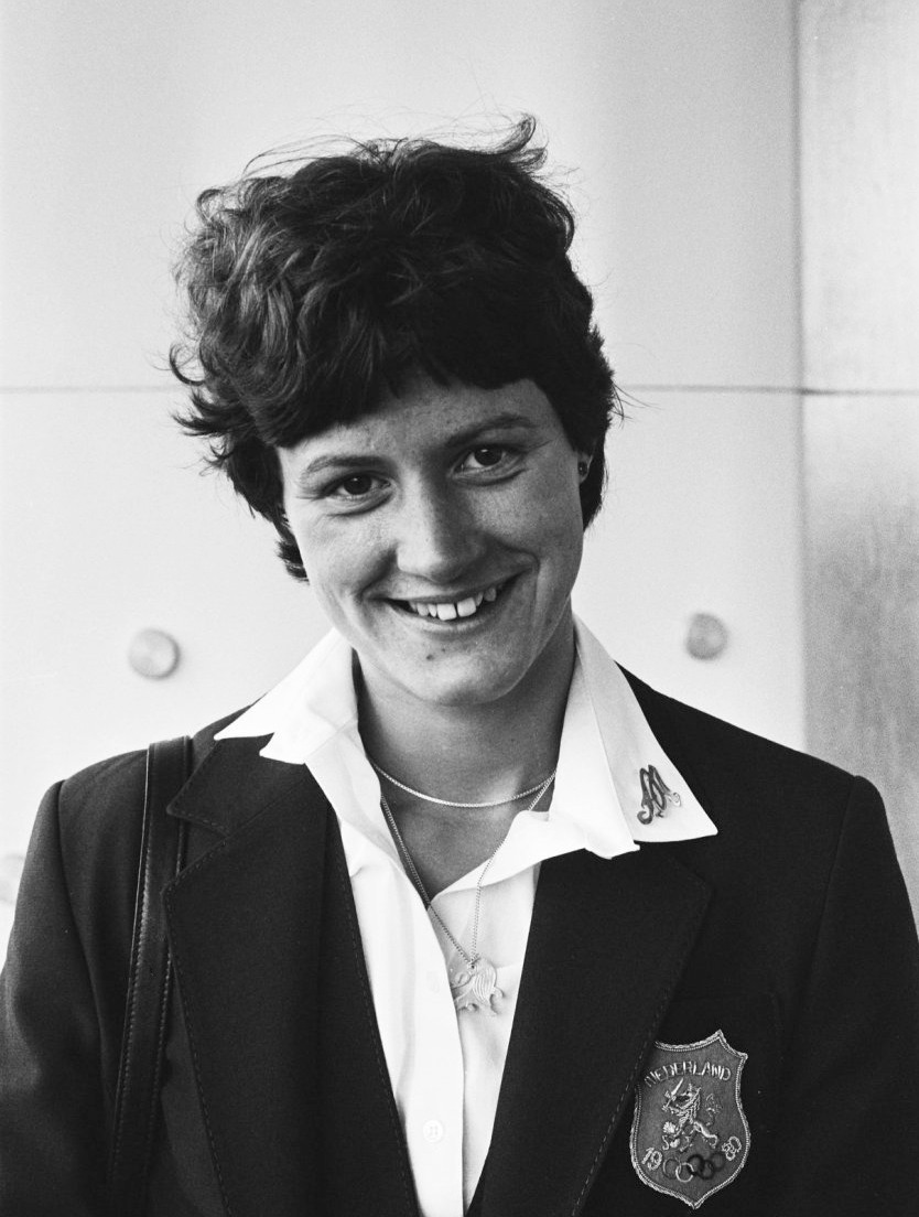 Vertrek Olympische schuttersploeg van Schiphol naar de zomerspelen in Moskou. Marijke Kegge